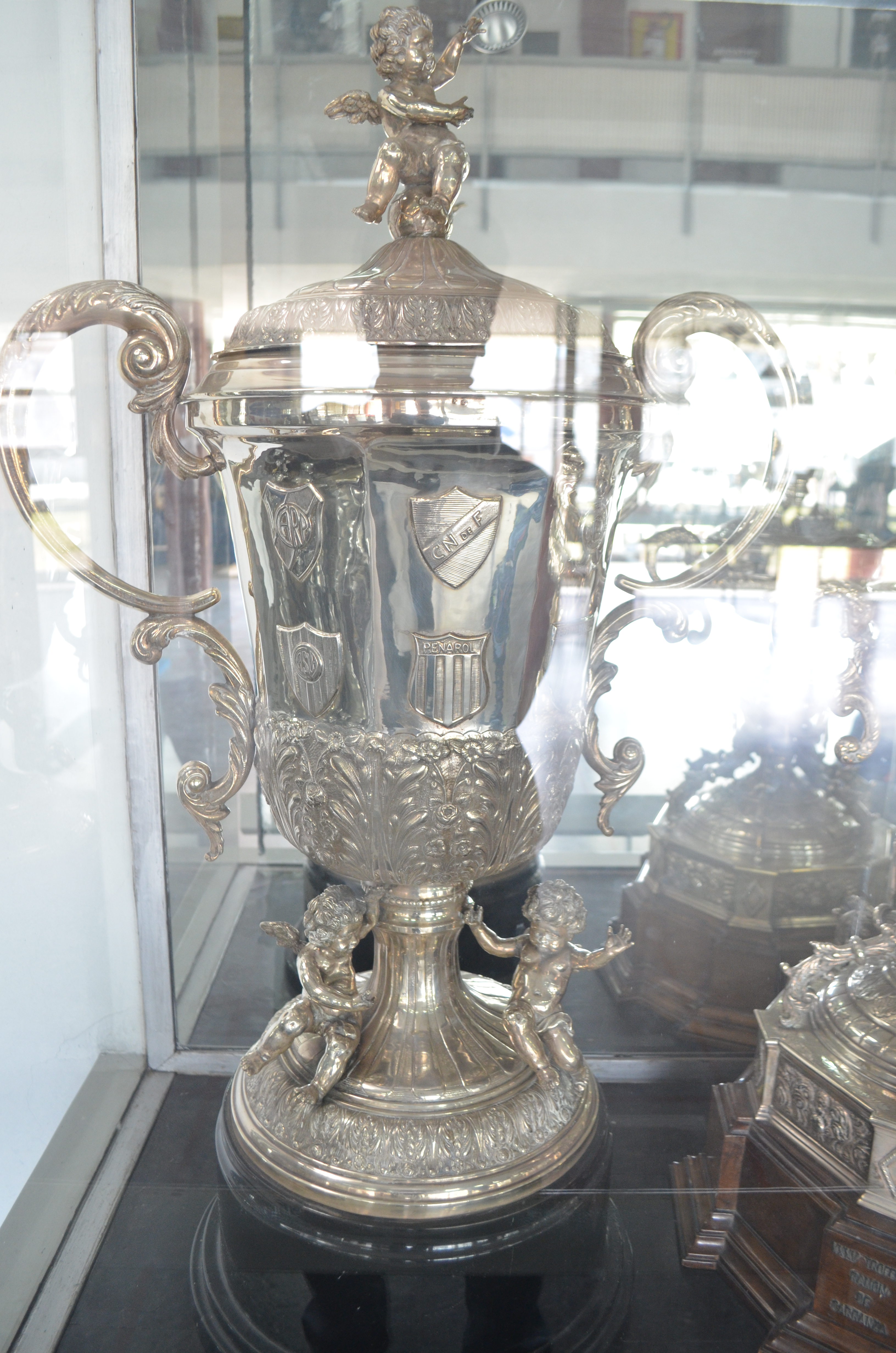 Imagen de la Copa Montevideo en la sede de Nacional